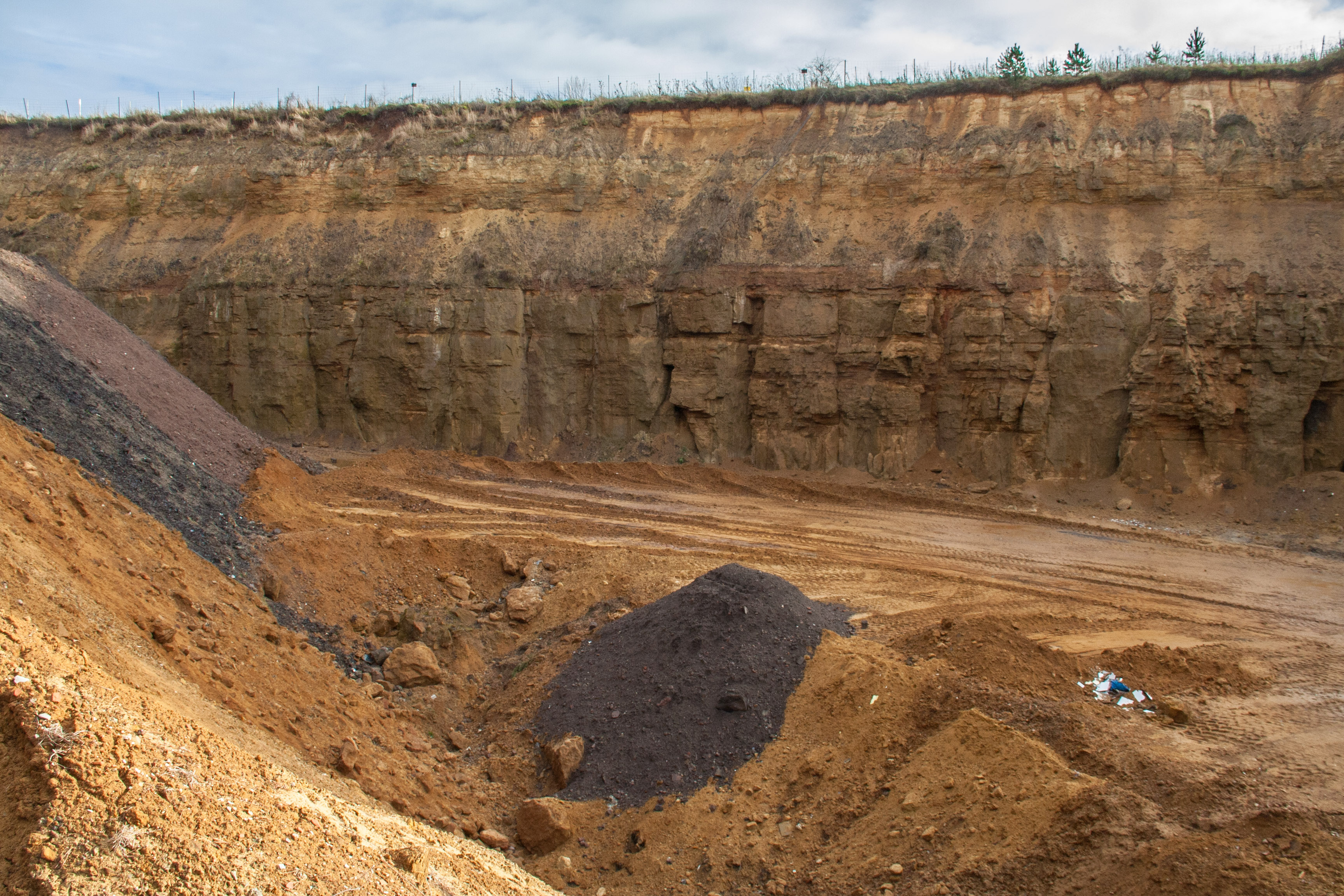 Dillberg, Gitzberg, Sandgrube